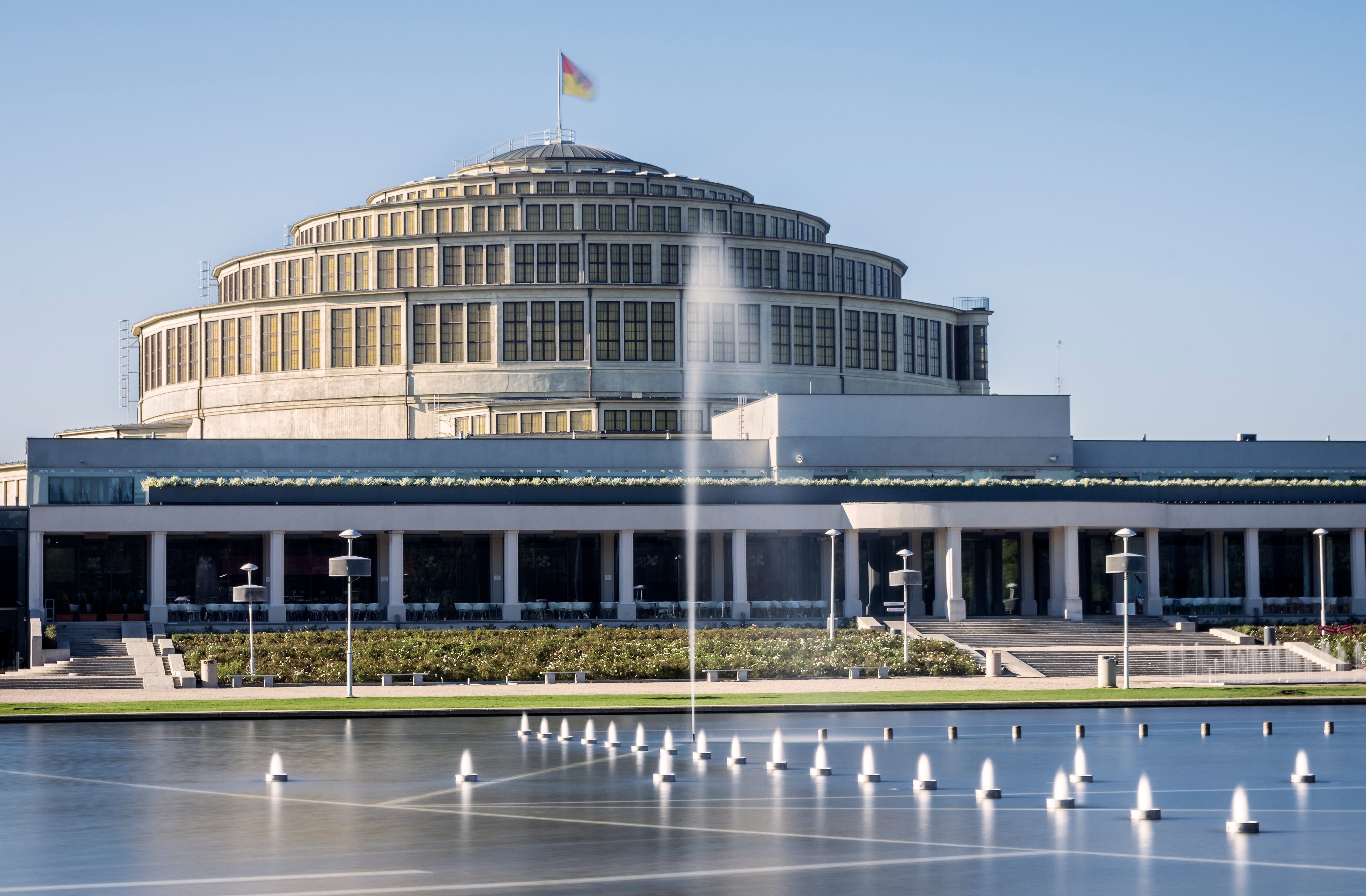 Wrocław, Hala Stulecia wraz z fontanną